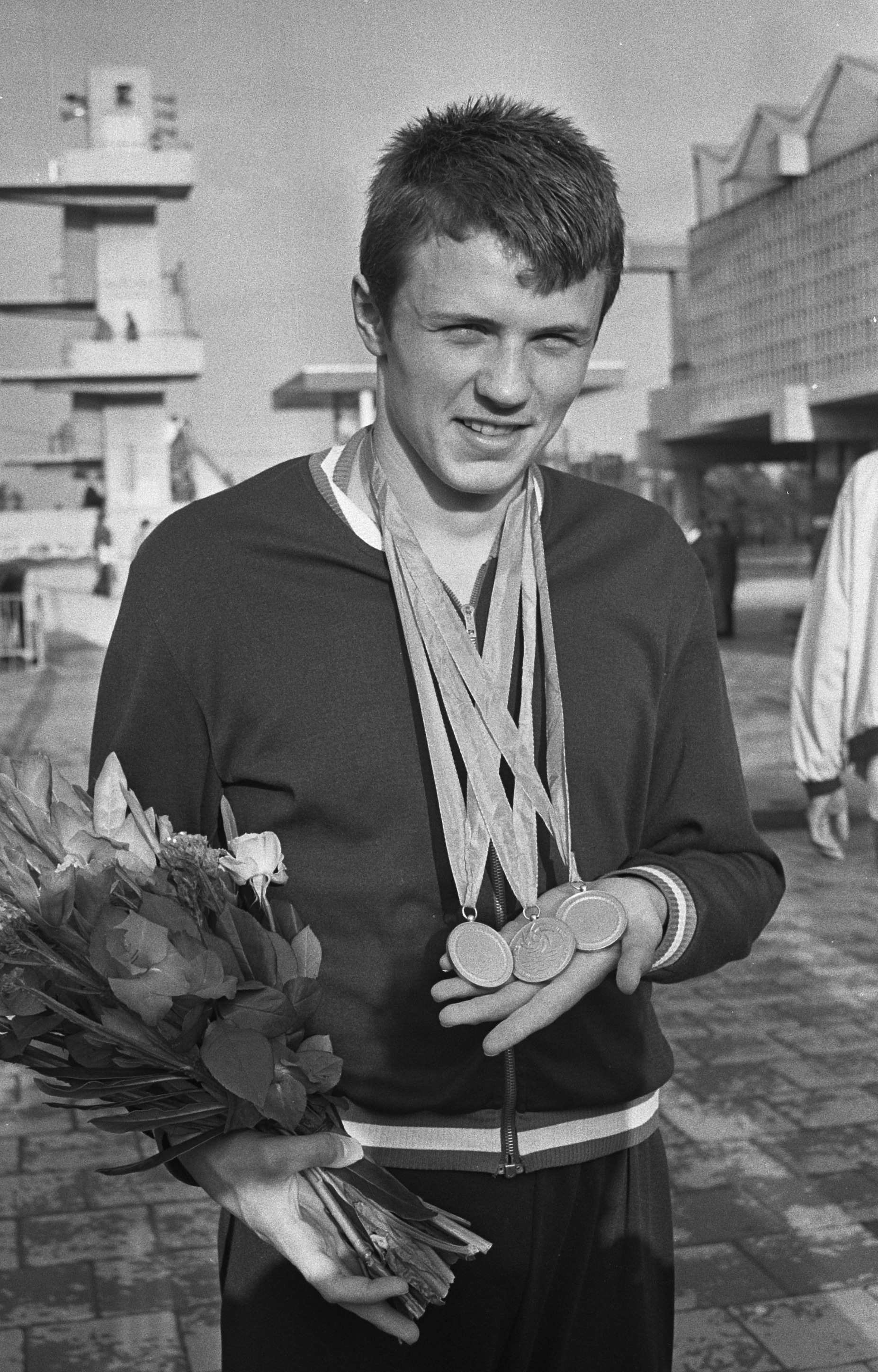 András Hargitay at the European Junior Championships in Rotterdam